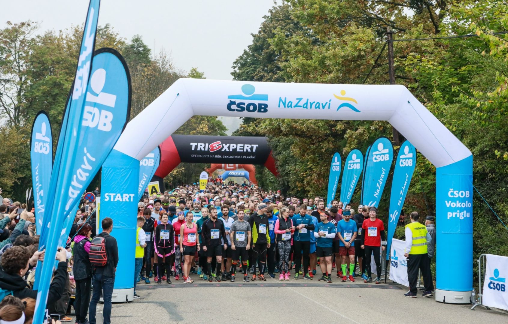 Start/cíl závodu ČSOB Vokolopříglu